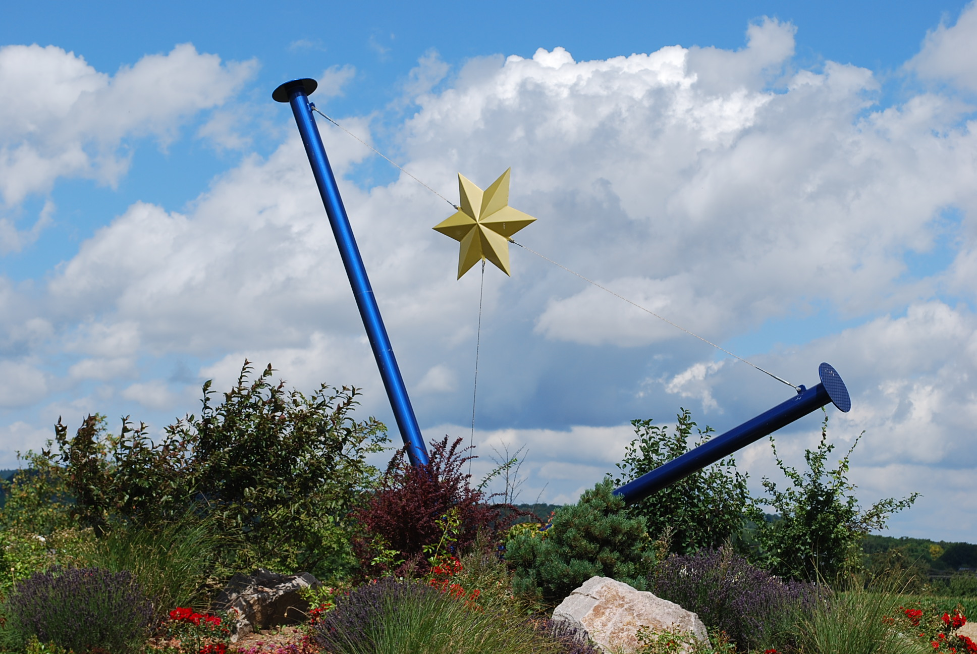 Verkehrskreisel am südlichen Ortsrand mit zwei überdimensionalen Nägeln - Symbol für die ehem. Nagelfabrik